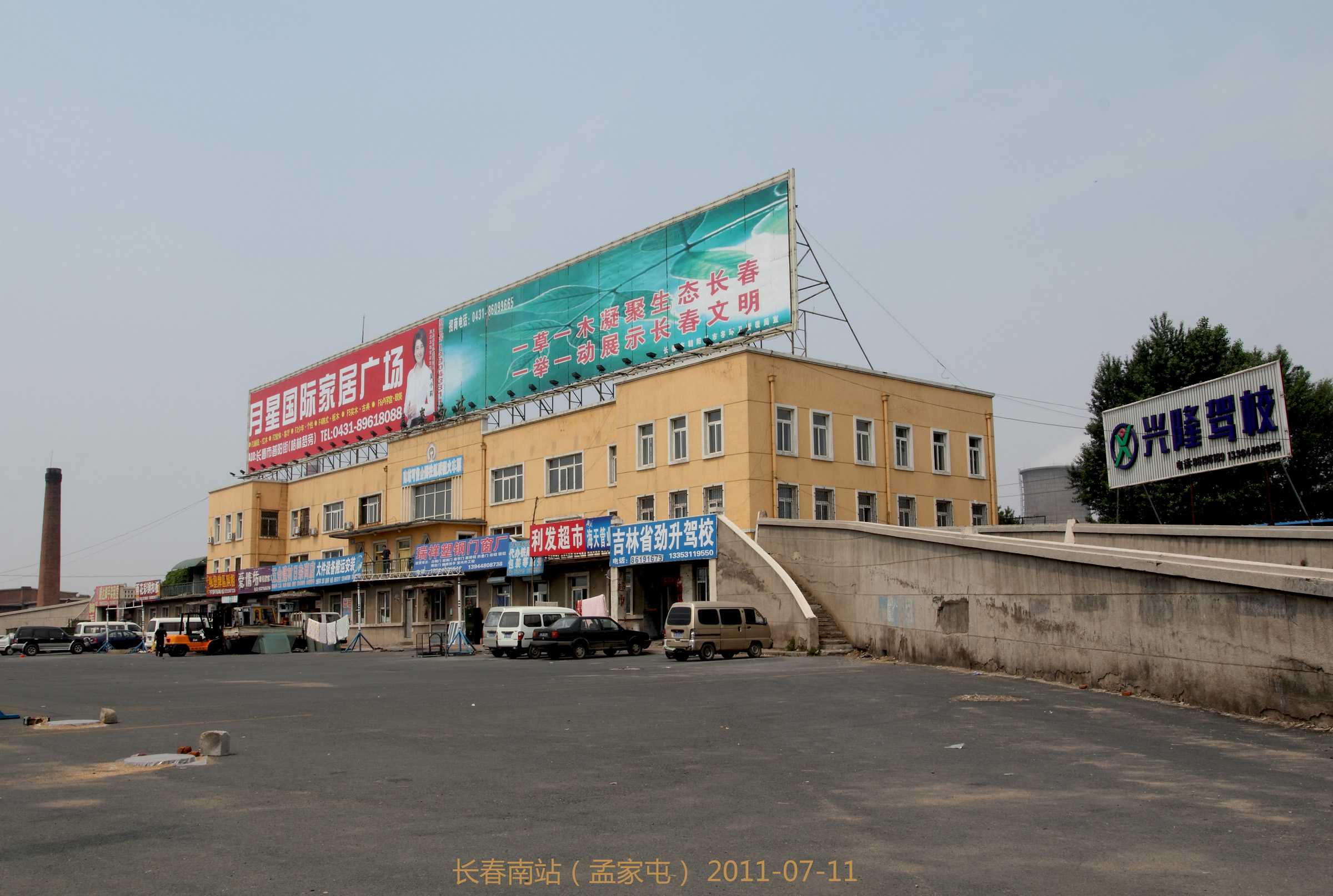 长春南站（孟家屯） Changchun Nanzhan